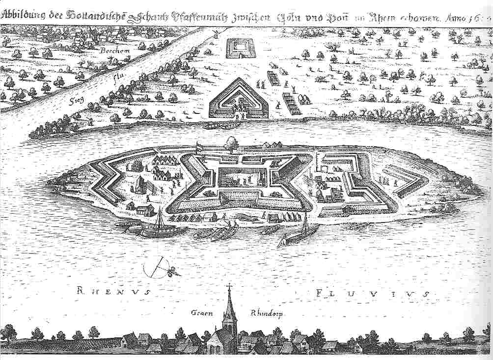 Merian: Theatrum Europaeum I - Schanze "Pfaffenmütze" auf der Rheininsel "Kemper Werth" um 1621